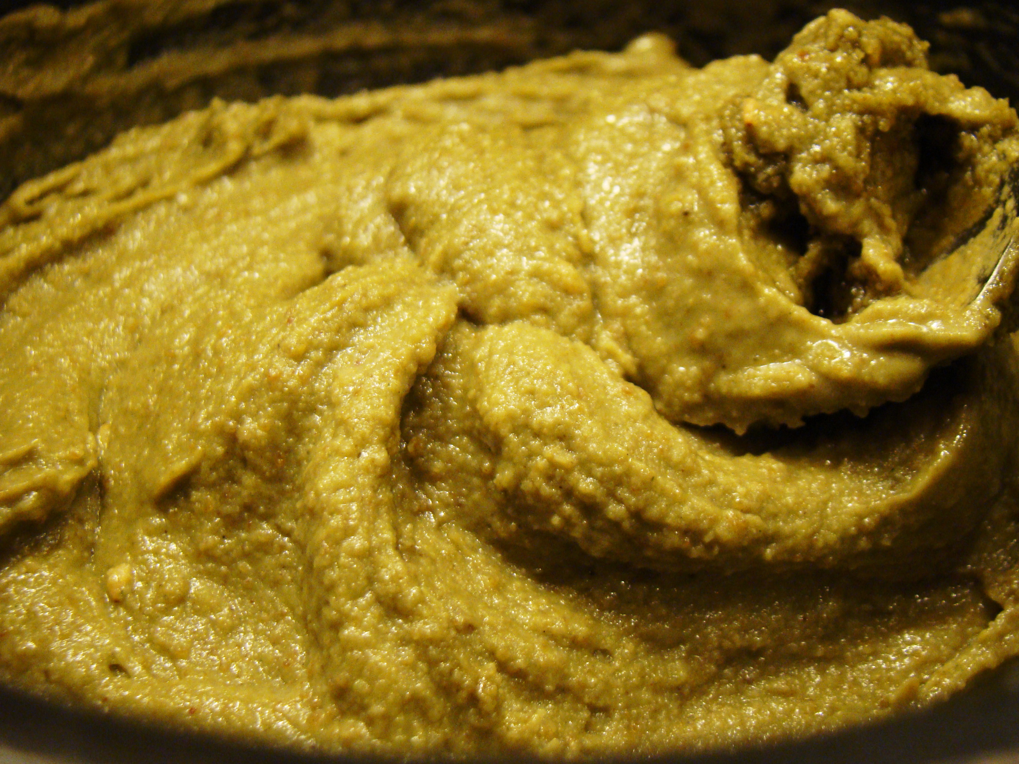 Sweet Verde Mole